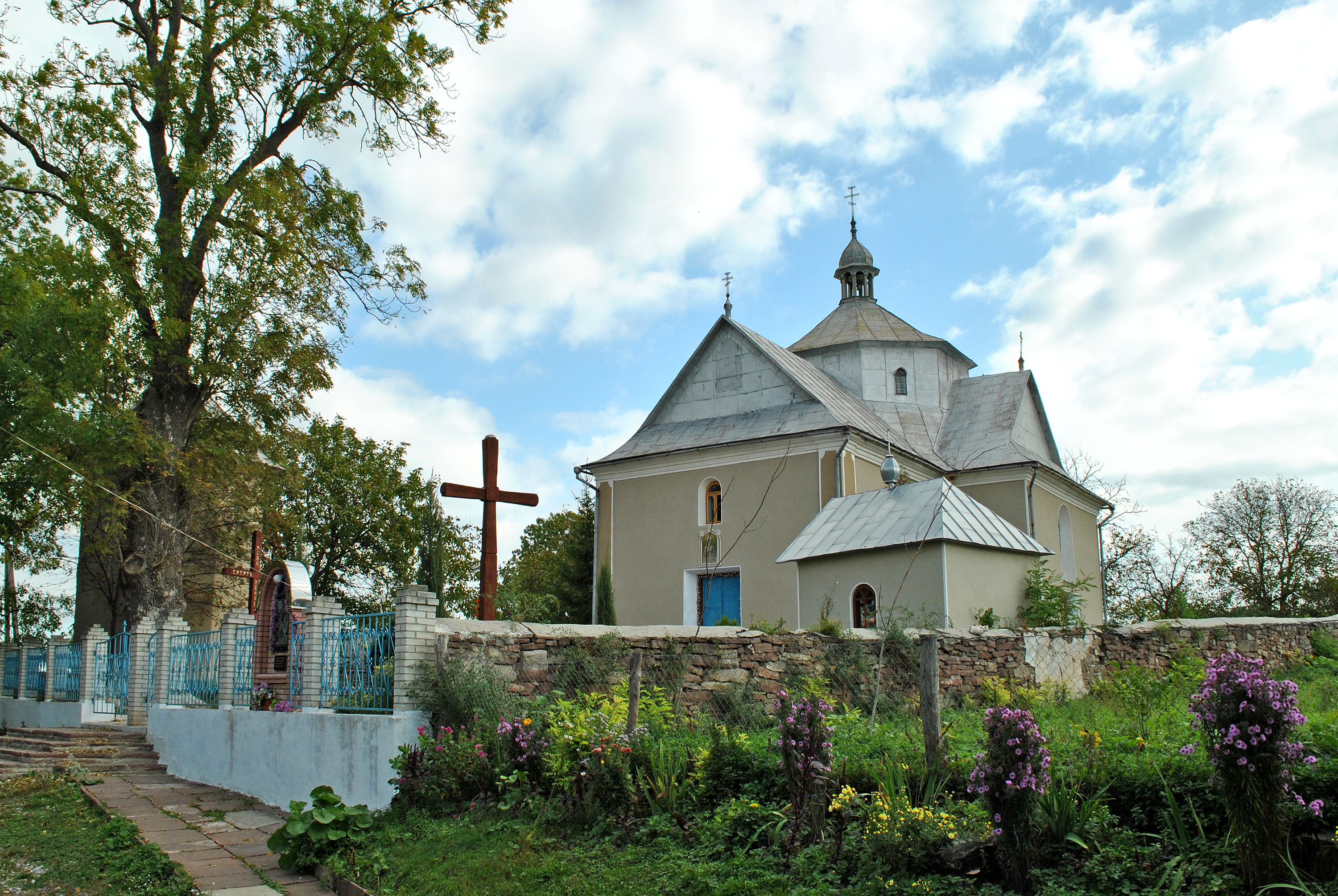 Церква св. Миколая УГКЦ с. Берем'яни Бучацького району Тернопільської області.